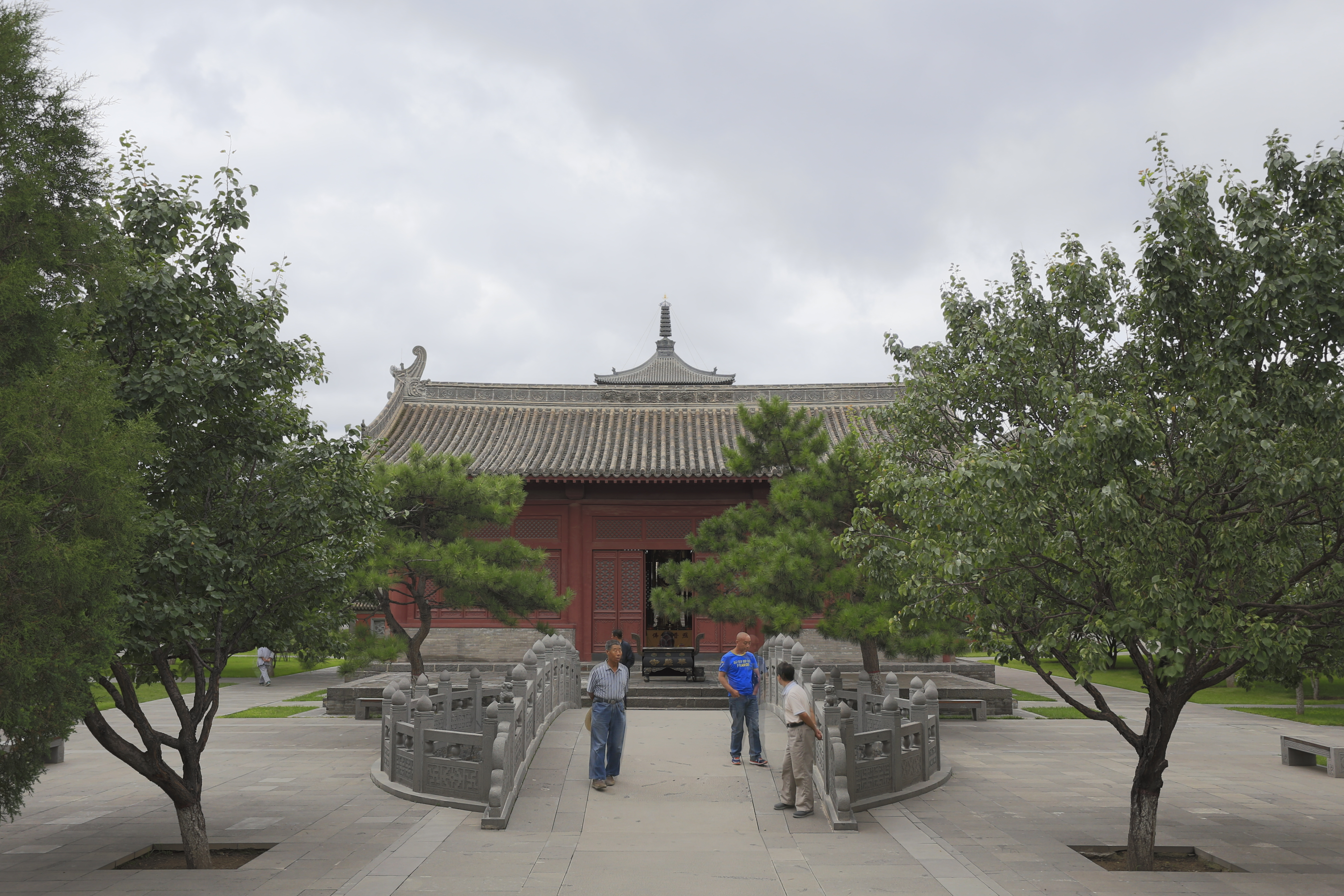 大同华严寺—— 观音殿